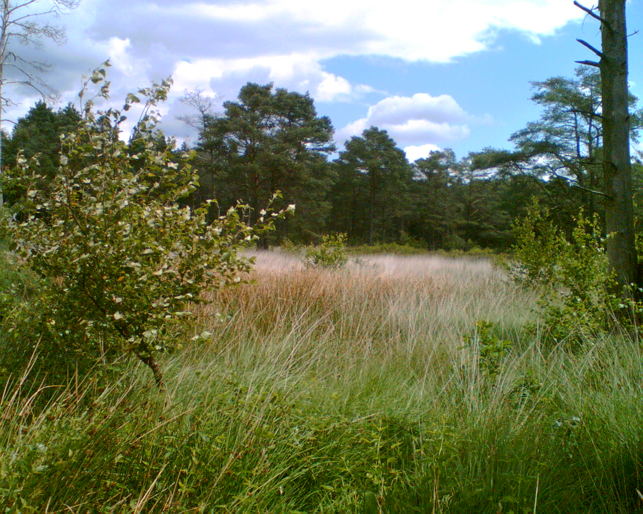 Das Schnaakenmoor in Hamburg-Rissen zur Sommerzeit